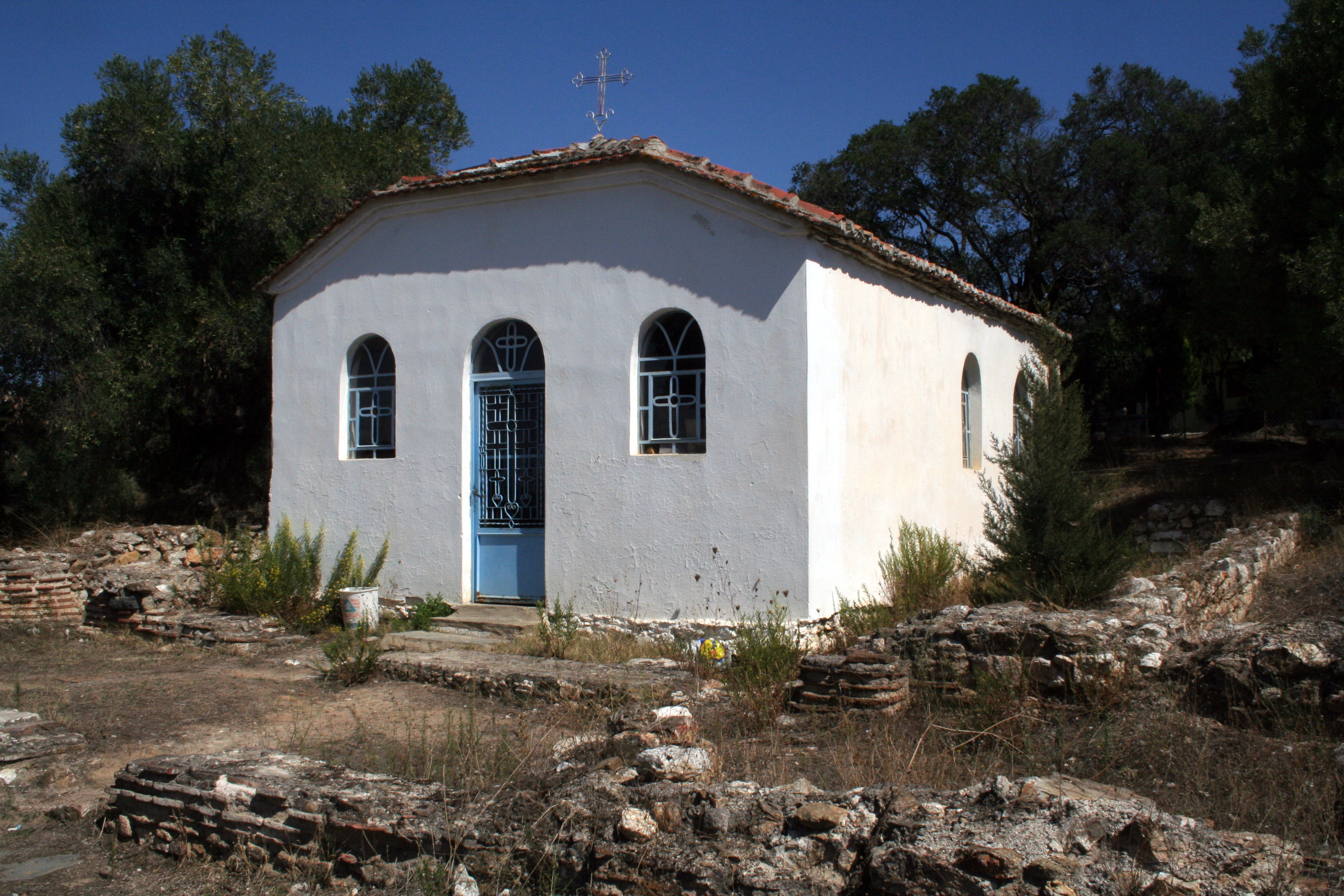 Ágios Geórgios auf den Grundmauern einer frühchristlichen Basilika.